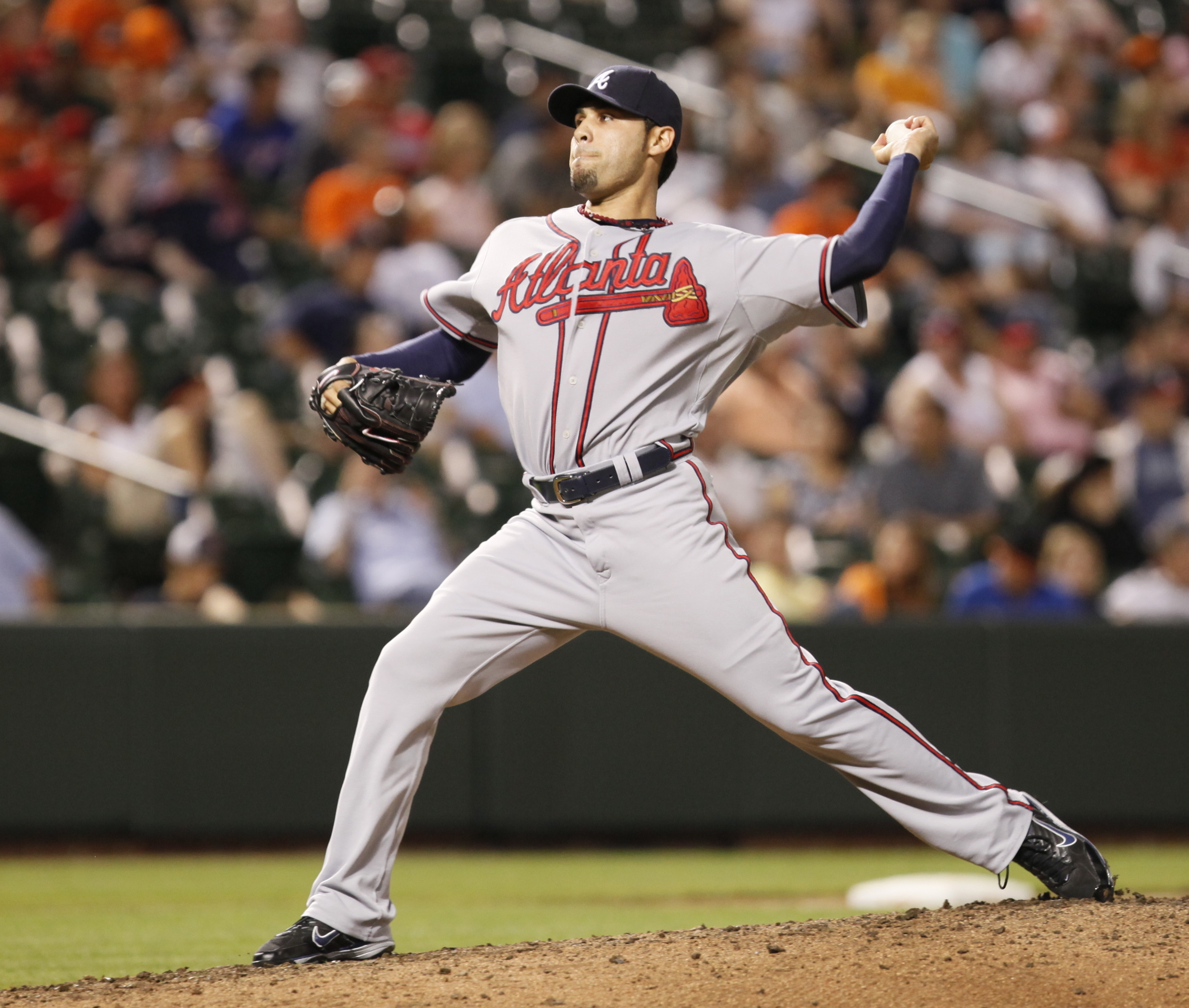 Michael Gonzalez